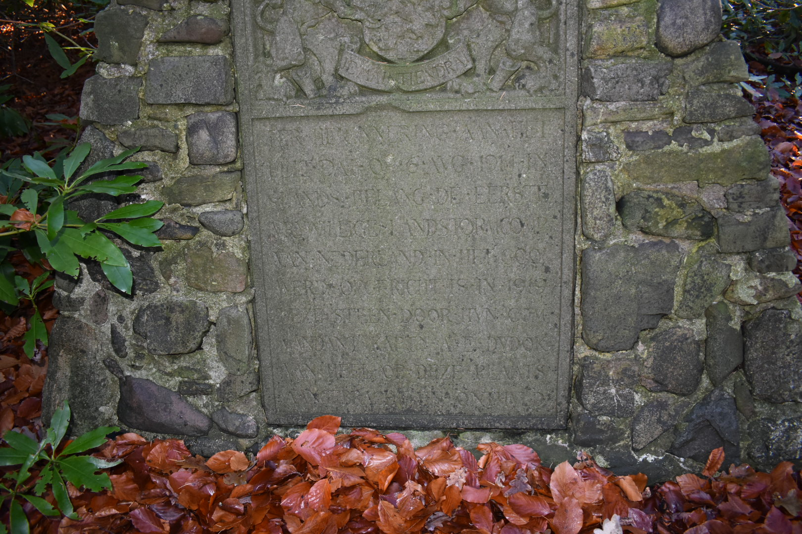 Monument voor de eerste compagnie van de Vrijwillige Landstorm in Nederland, opgericht op 6 augustus 1914 in Het Gooi door kapitein A.E. Dudok van Heel. Plaats: Gooise Meren (Naarden). Onthuld: 1919.